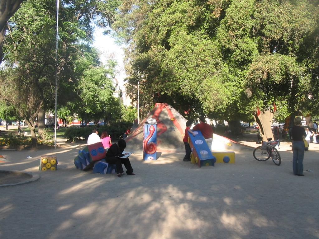 El mismo día que tomé las fotos de la Basílica del Salvador, pasé por la Plaza Brasil, de la cual tengo buenos recuerdos de mi infancia. Lamentablemente me quedé sin batería... Y sin fotos del columpio, mi juego favorito.